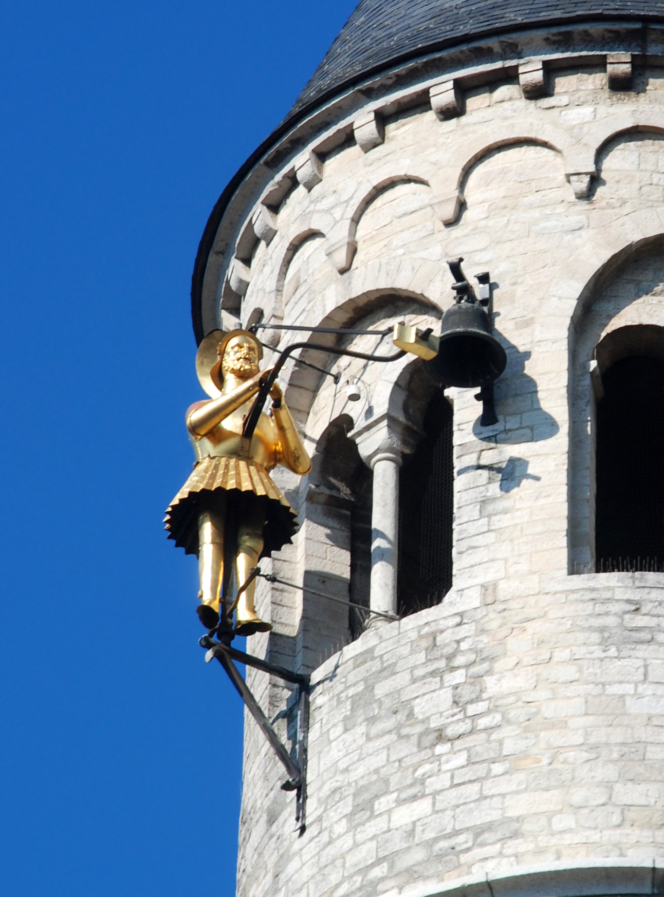 Belgique - Brabant wallon - Nivelles - Collégiale Sainte-Gertrude